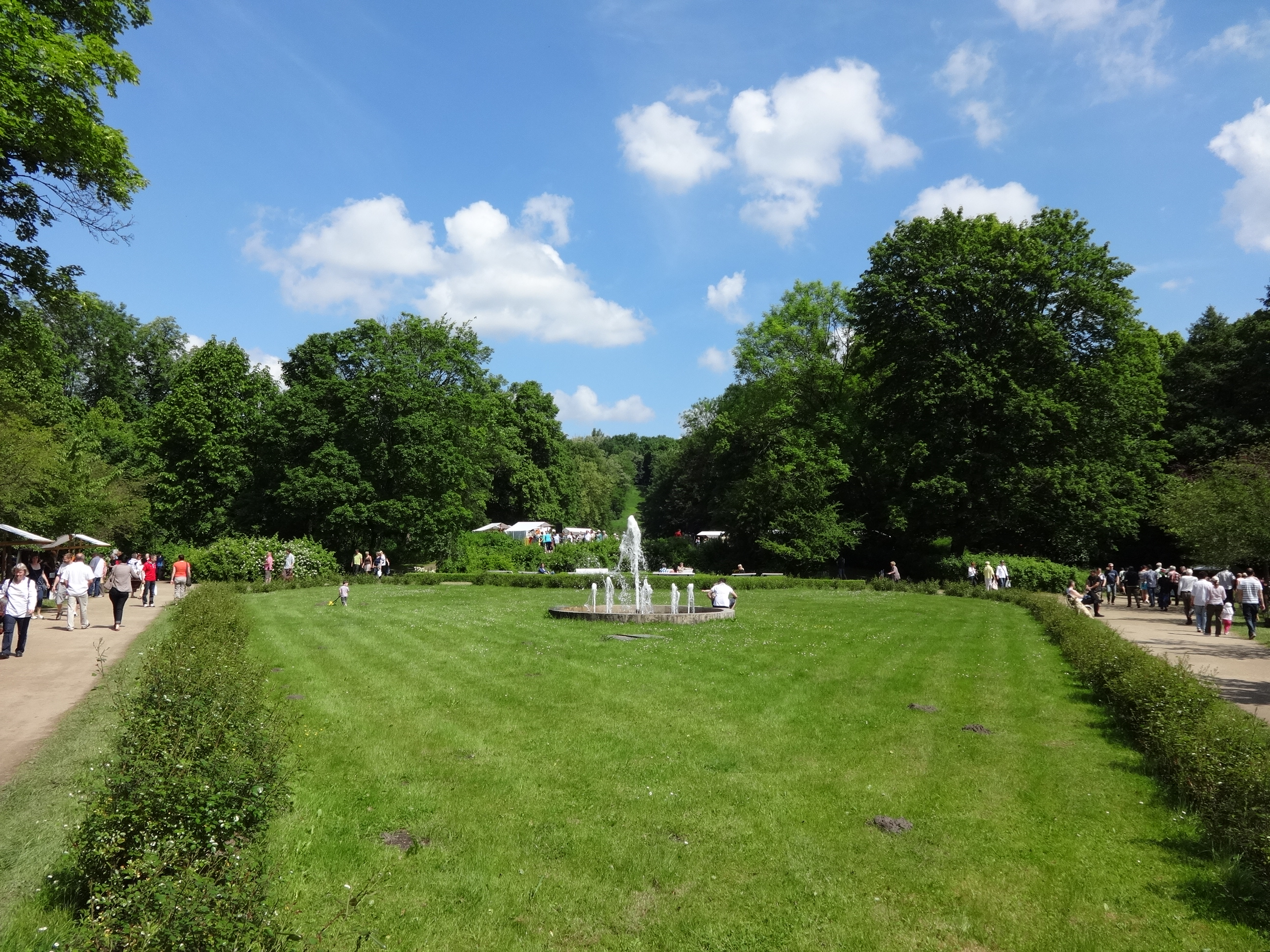 Schlosspark in Buckow (Märkische Schweiz): Im 17. Jahrhundert entstand neben dem Schloss ein Garten im Stil des Barock. Er bestand aus einem Lustgarten mit Blumenbeeten sowie einem Nutzgarten für die Schlossküche. Beide sind heute nicht mehr erhalten. Im 18. Jahrhundert als englischer Landschaftsgarten umgeplant erhielt er seine heutige Gestalt Ende des 19. Jahrhunderts. Er wird unter anderem als Veranstaltungsort für Sommerkonzerte und die Buckower Rosentage genutzt. Am nördlichen Ende erhebt sich der 61 Meter hohe Schlossberg.